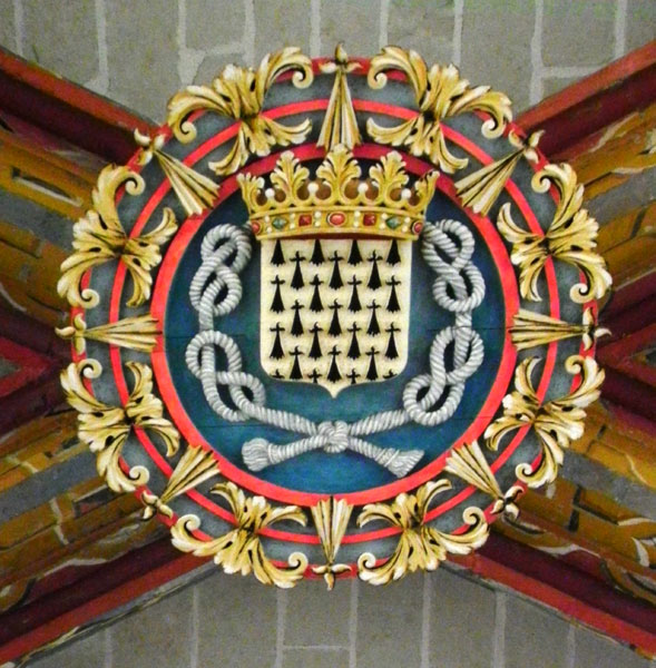 Naoned. Iliz-Veur. Ardamezioù Breizh. Kordenn-c'houriz